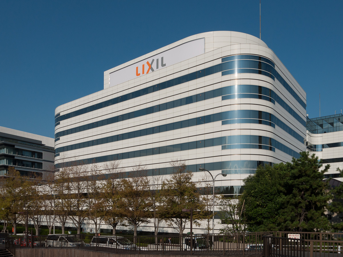 リクシル本店（旧トステム本社）ビル、東京都江東区大島1丁目。